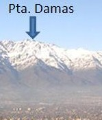 Cerro Punta Damas, Santiago de Chile